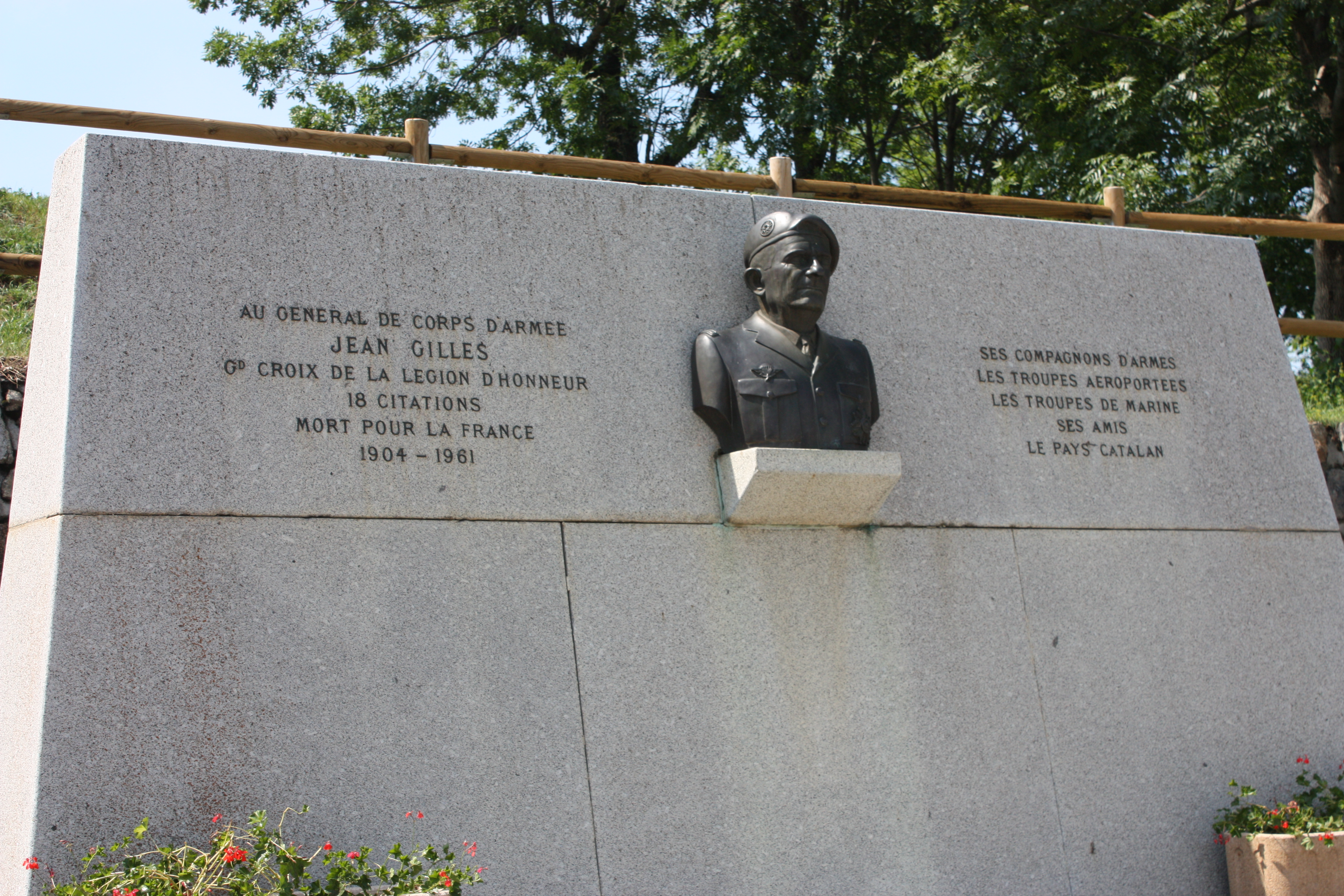 Monument en l'hommage du général Jean Gilles situé dans la ville de Mont-Louis dans les Pyrénées-Orientales